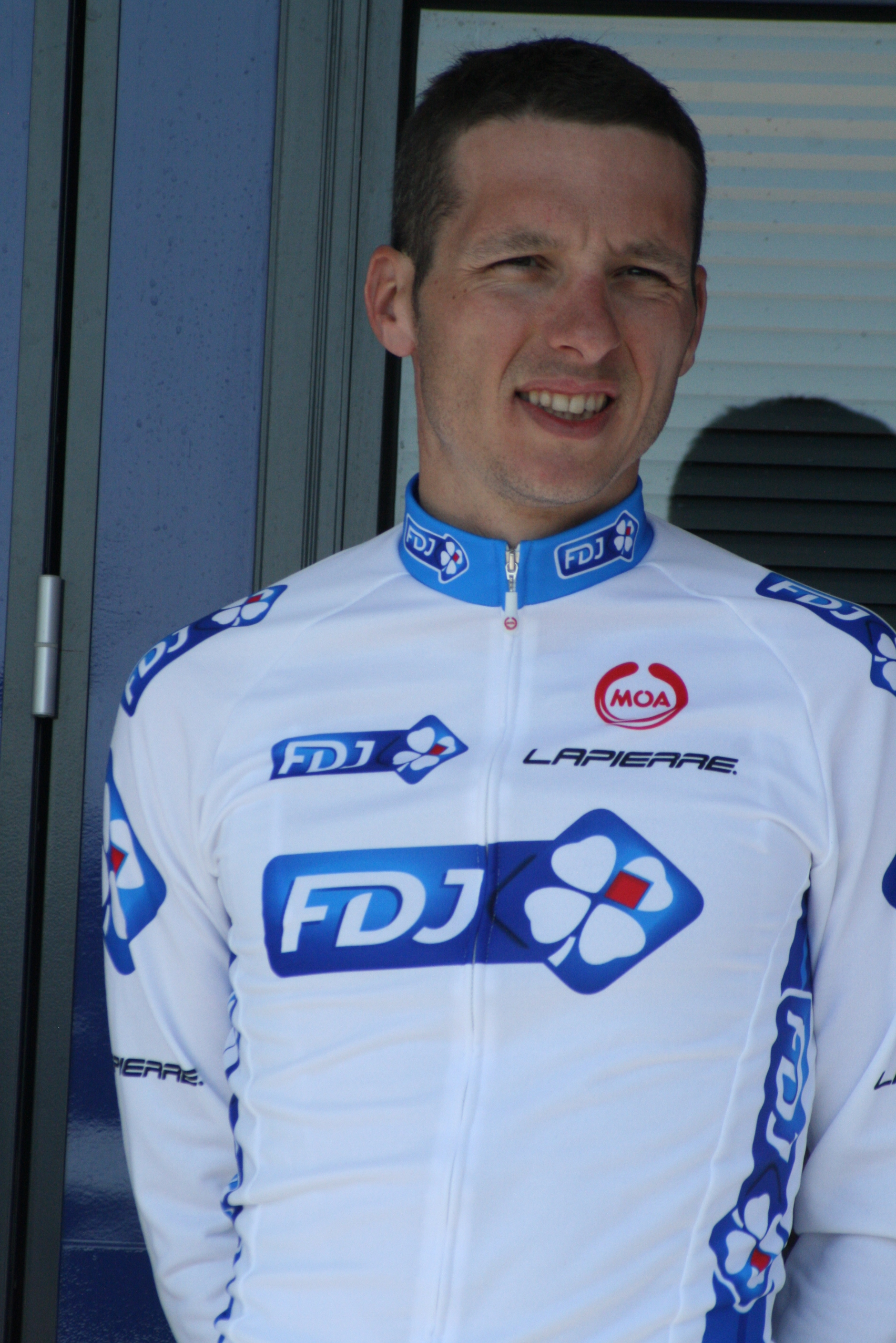 Présentation des coureurs au départ de la première étape Anthony Geslin